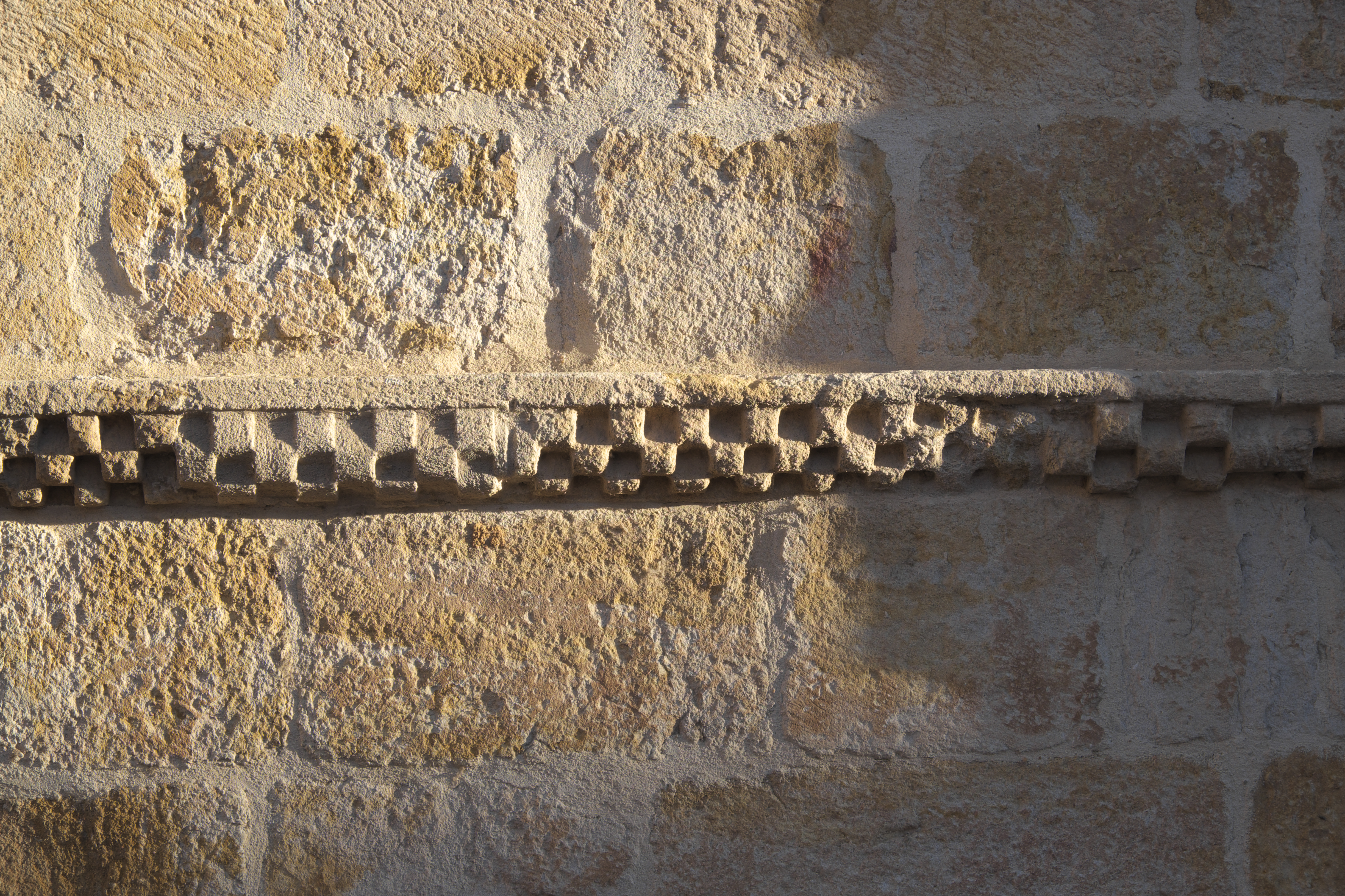 Kirche Santo Tomé in Zamora (Kastilien-León/Spanien), Schachbrettfries